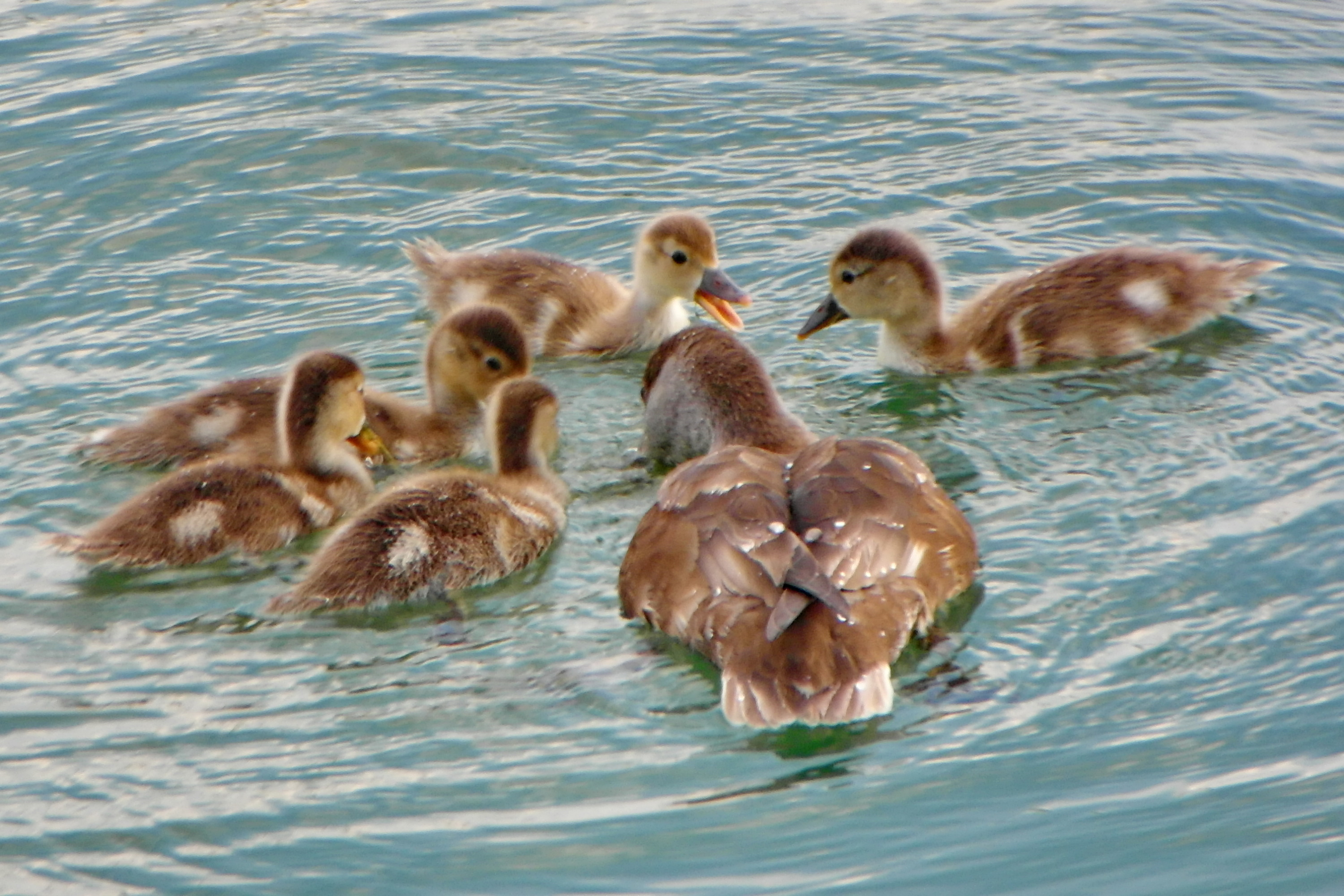 Netta rufina, General-Guisan-Quai in Zürich-Enge (Switzerland)